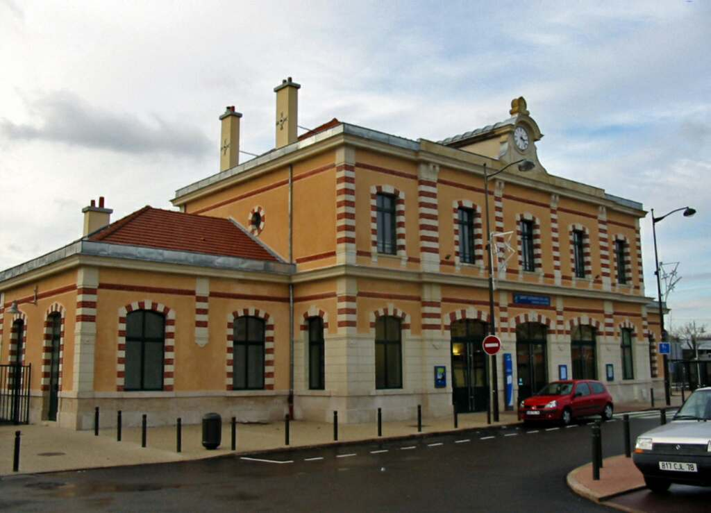 Gare de Saint-Germain-Grande-Ceinture ; Photo JH Mora décembre 2004